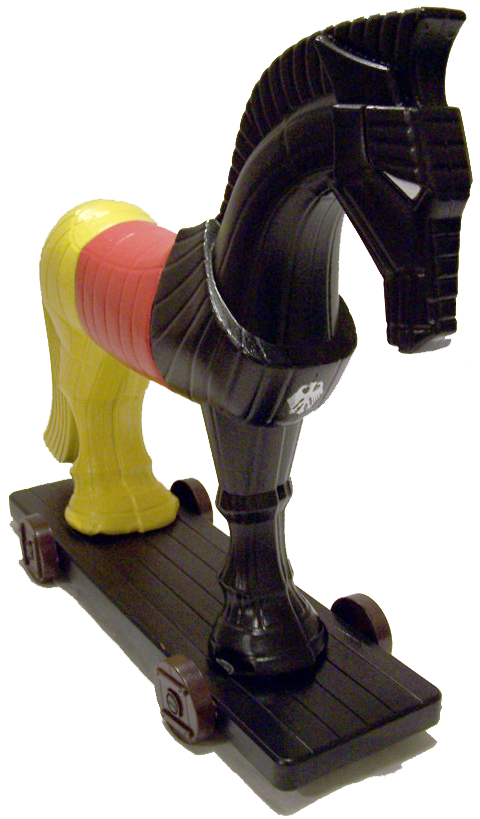 Foto des Bundestrojaner-CCCeBIT-Award des Chaos Computer Clubs